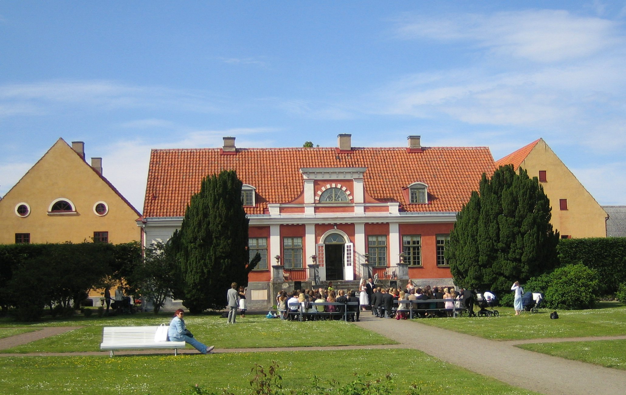 Katrinetorp Manor in Malmö, Sweden.